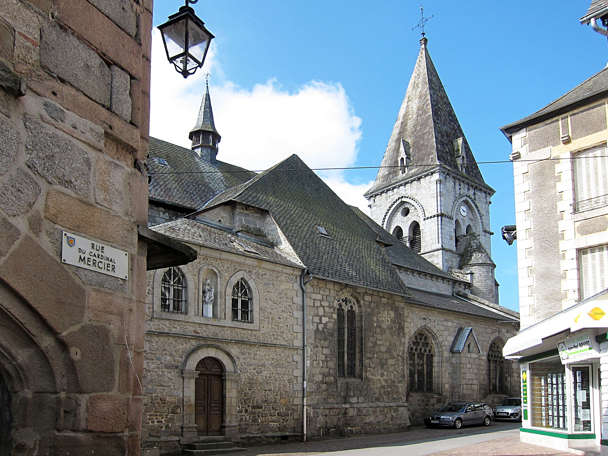 Vue latérale de l'église Saint Martin d'Ussel (Corrèze).